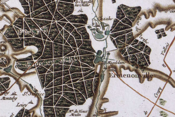 Ermenonville (France) - Carte de Cassini, vers 1780